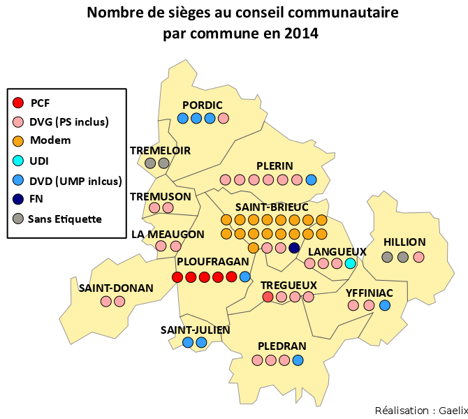 Nombres de siège au conseil communautaire après les élections de 2014.